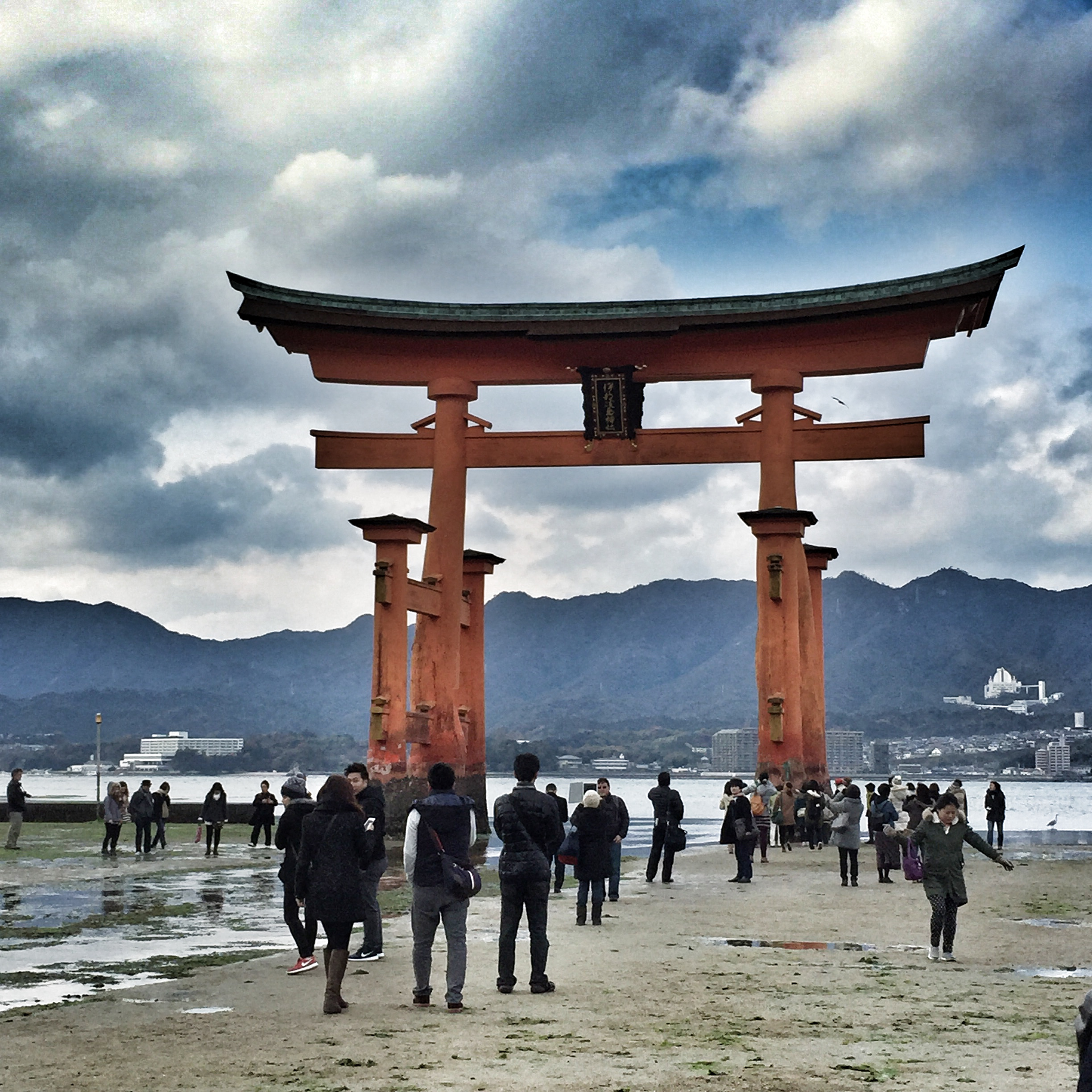 1167-1 Miyajimachō, Hatsukaichi-shi, Hiroshima-ken 739-0588, Japan